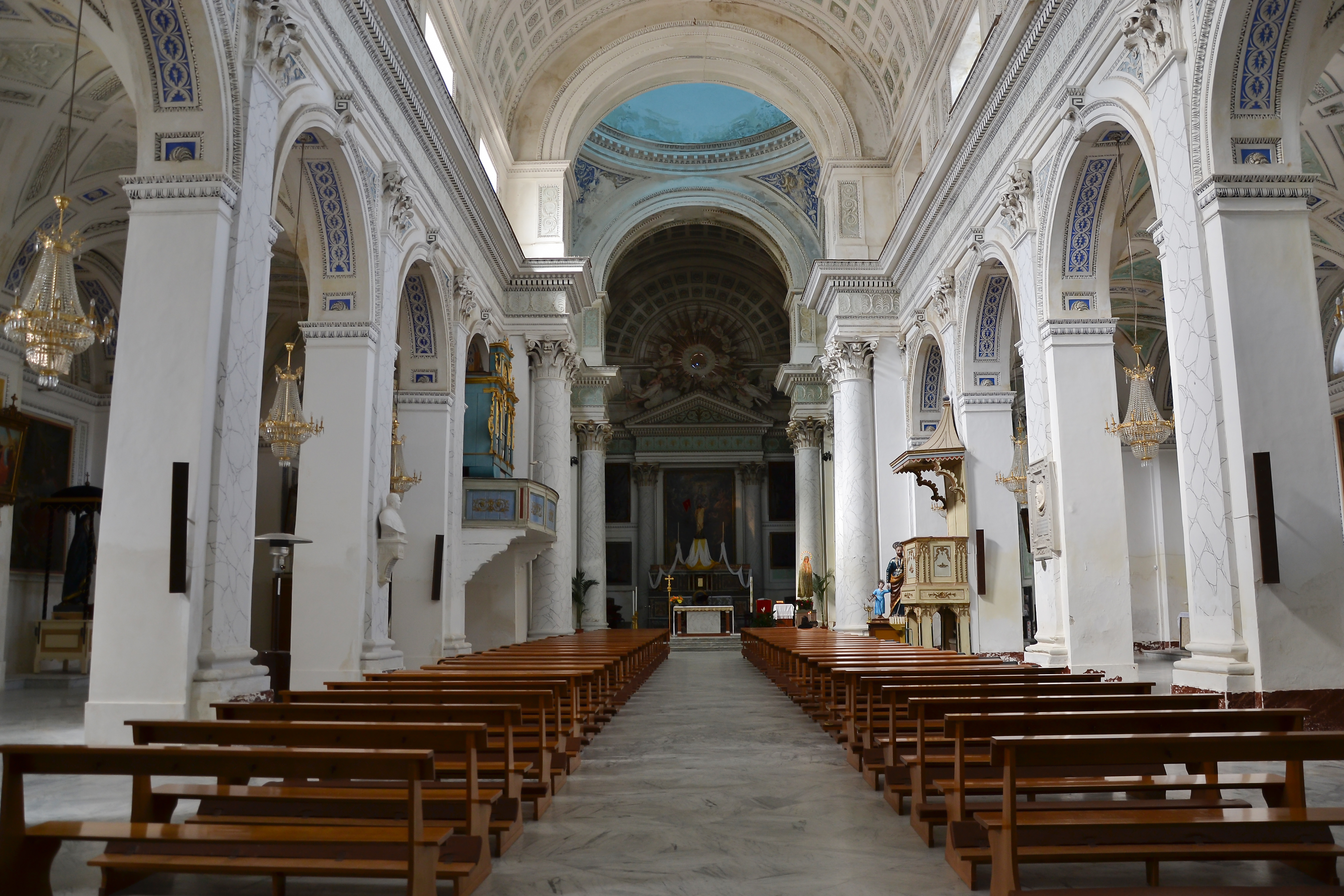 Chiesa Santa Maria Maggiore This is a photo of a monument which is part of cultural heritage of Italy.